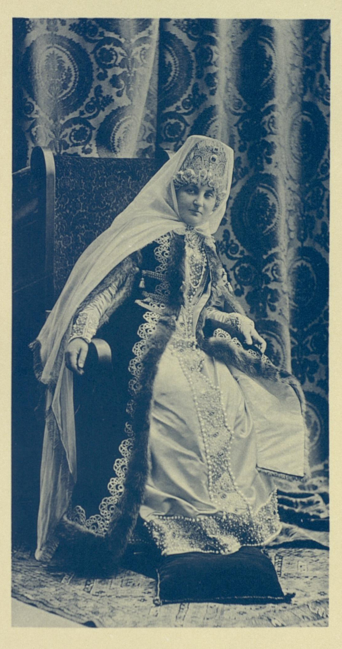 Надежда Иларионовна Танеева, урождённая Толстая, в одеяниях боярыни 17 века.